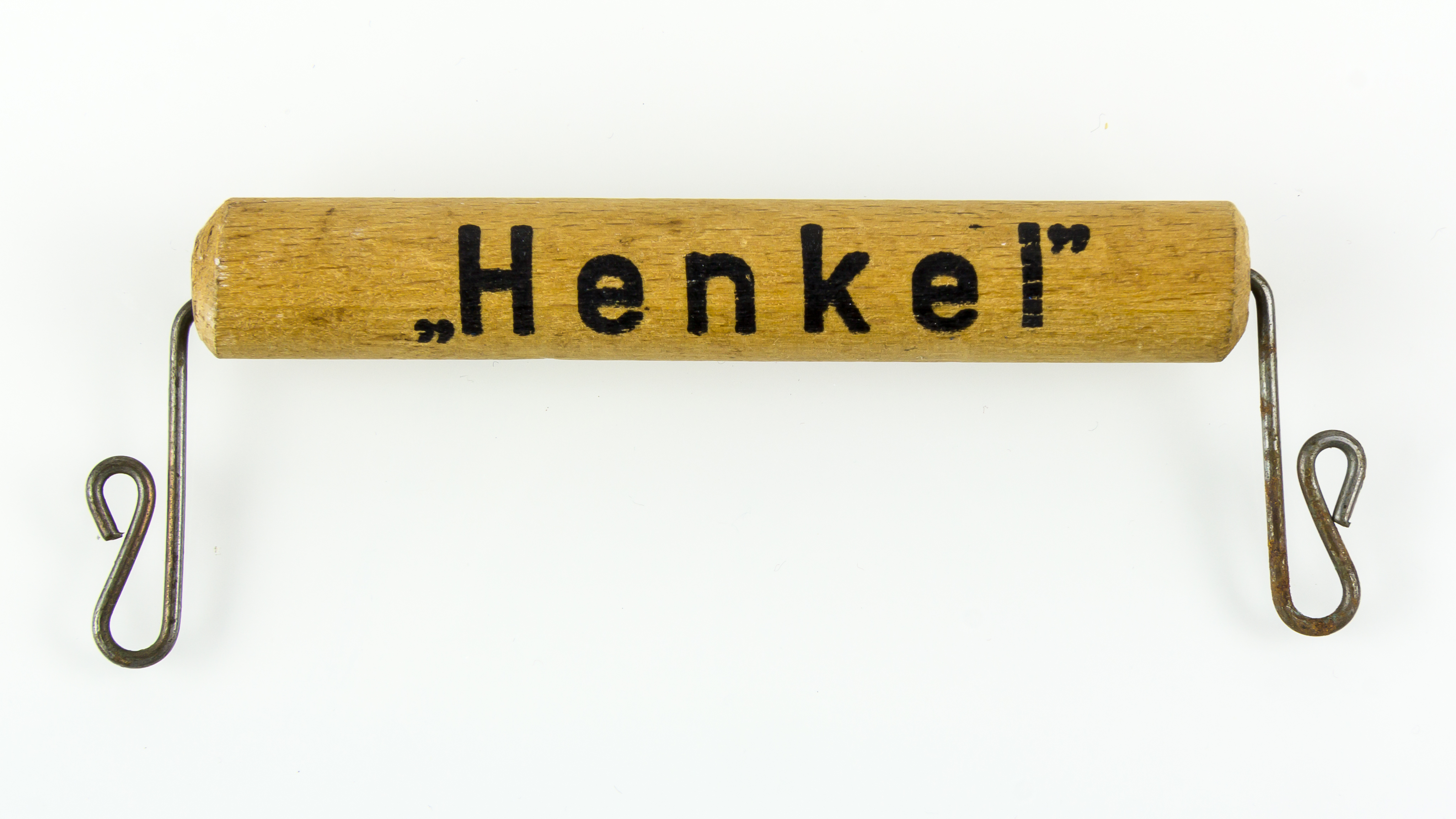 Henkel, Paketgriff